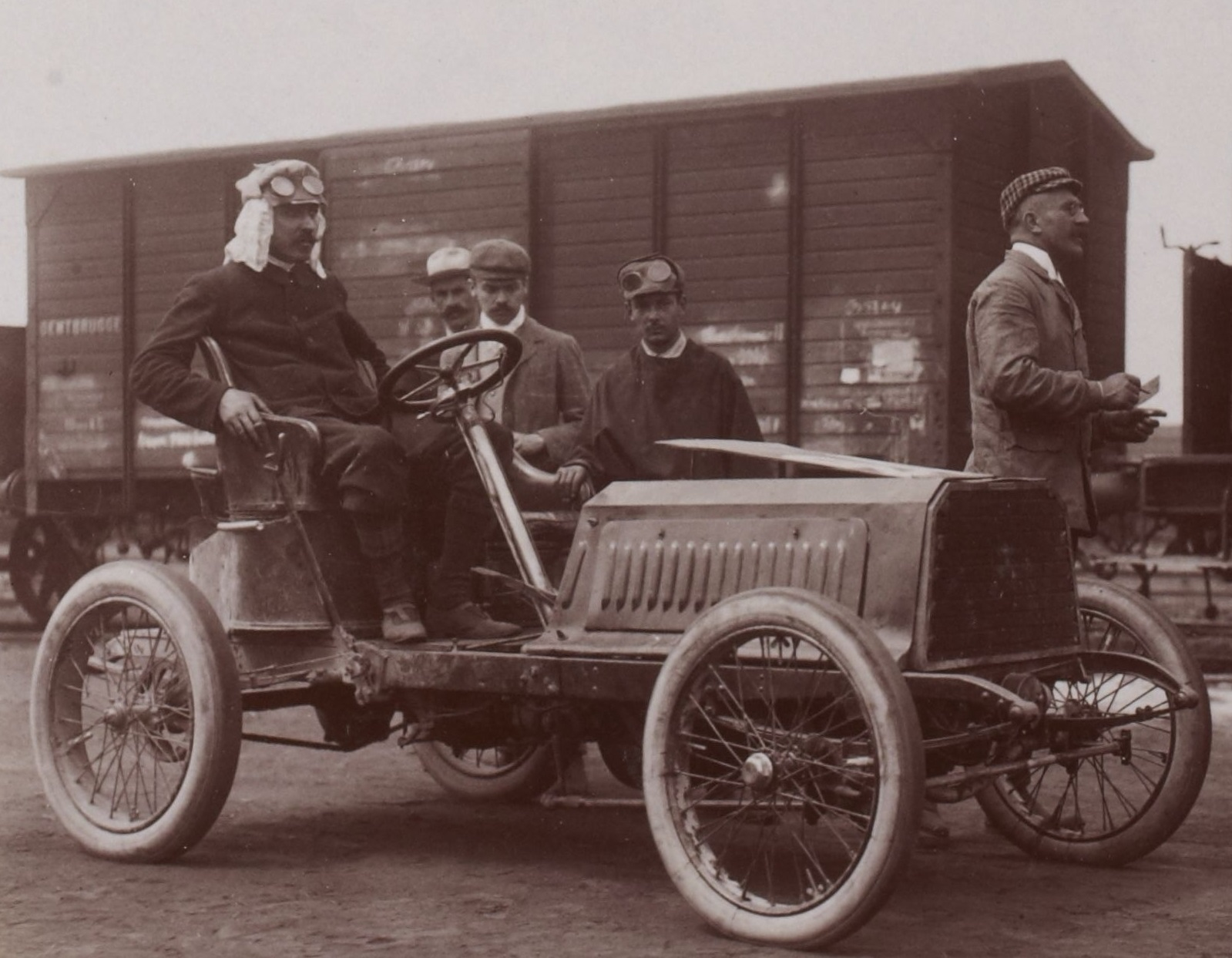 [Collection Jules Beau. Photographie sportive] : T. 27. Année 1904 / Jules Beau : F. 22. [Circuit des Ardennes, 23 juillet 1904]